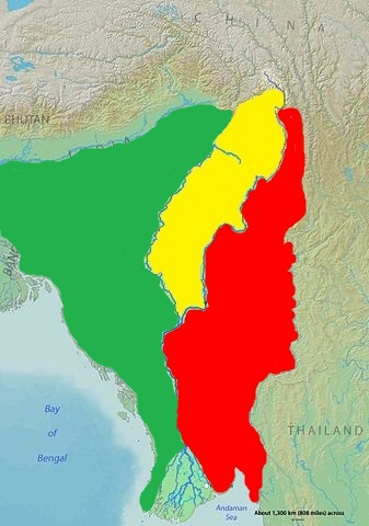 Distribution Hoolock Gibbons